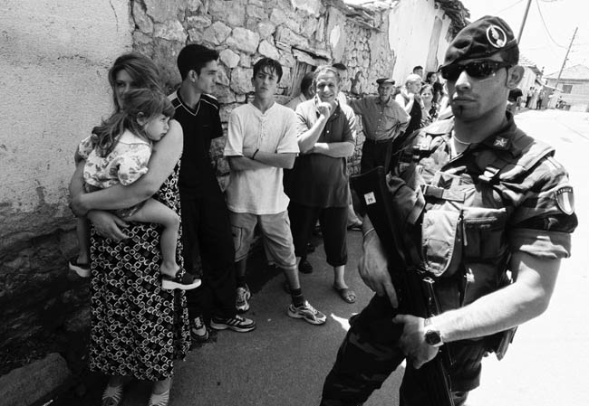 Косово и Метохија: Италијански војник КФОР-а чува српске и неалбанске становнике Ораховца. Фотографија из пројекта "Корени душе". Фото:Дарко Дозет